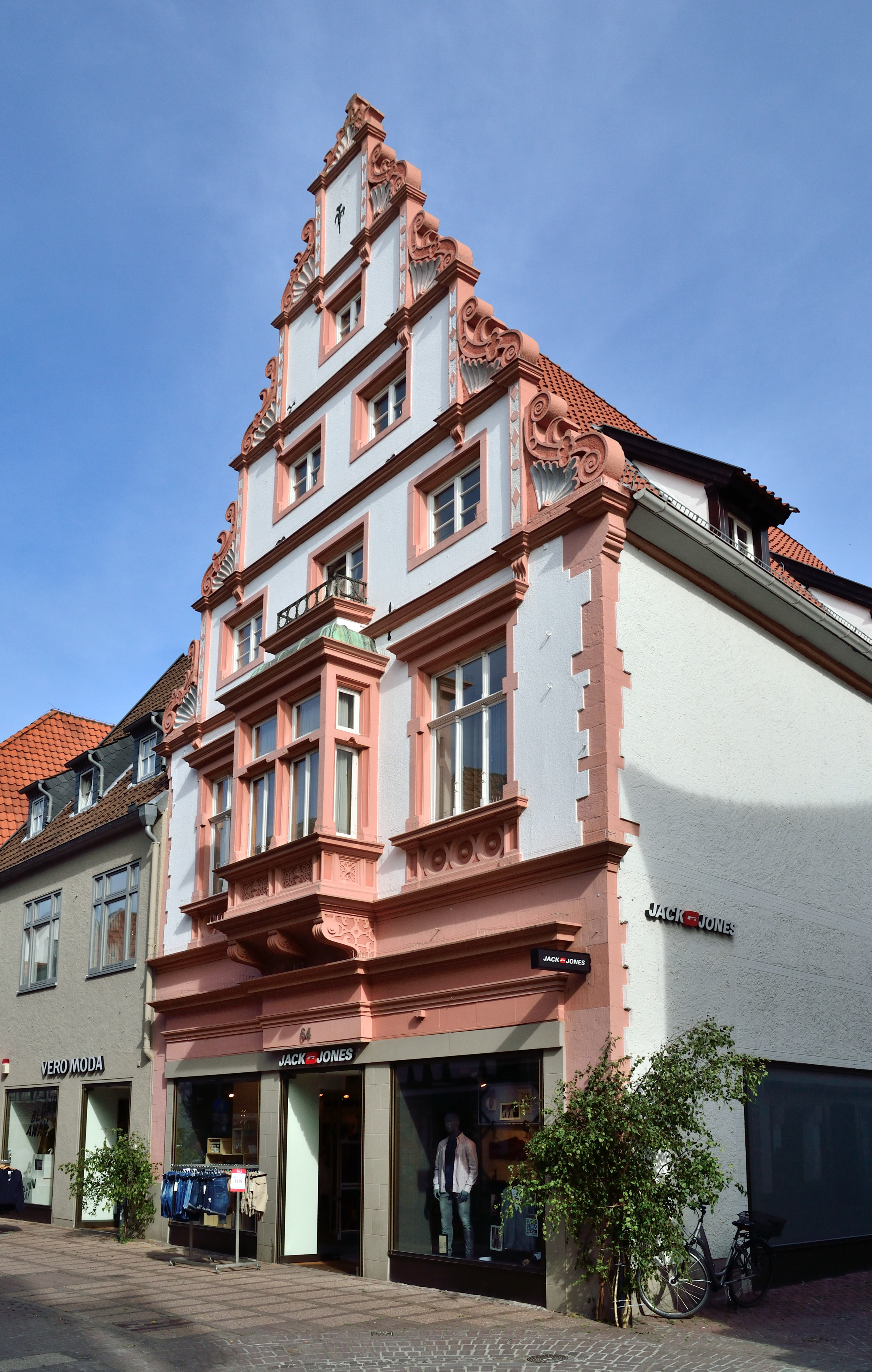 This is a photograph of an architectural monument.It is on the list of cultural monuments of Lemgo Renaissance-Steingiebelhaus, Geburtshaus von Maria Rampendahl